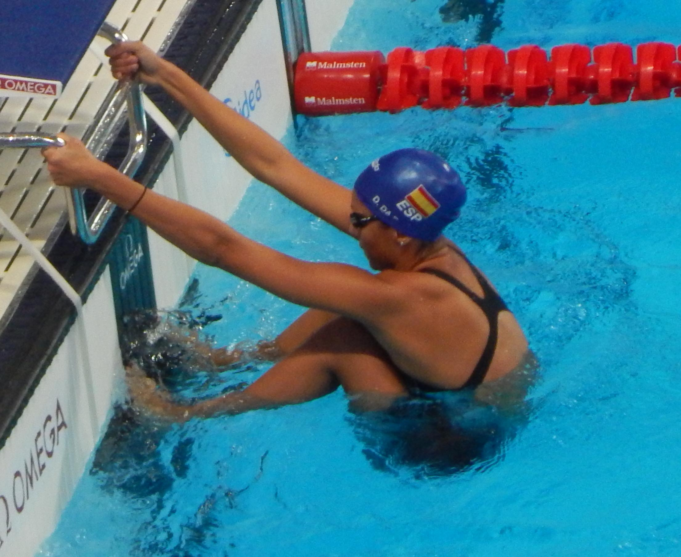 Дуане Да Роха на чемпионате мира 2015 в Казани